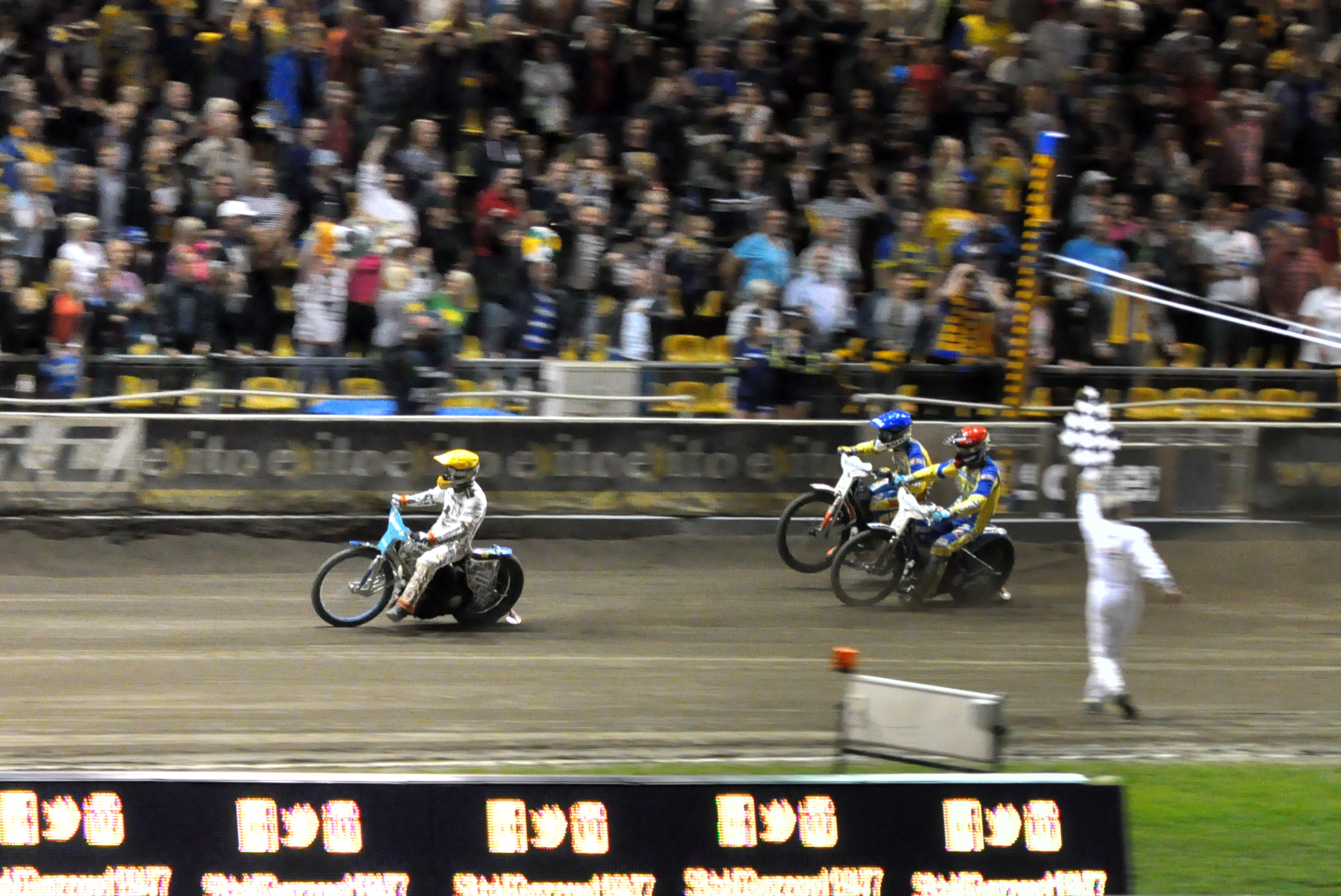 Gorzów Wlkp. - 15.08.2016 r. Derby Ziemi Lubuskiej nr 90. O wygranej zadecydował ostatni bieg Zwyciężyli P.Protasiewicz (czas 61,75) z J.Doylem (Ż) przed M.Zagarem (Cz) i N.K.Iversenem (N). Na zdjęciu: linię mety minęli zawodnicy drugi, trzeci i czwarty.